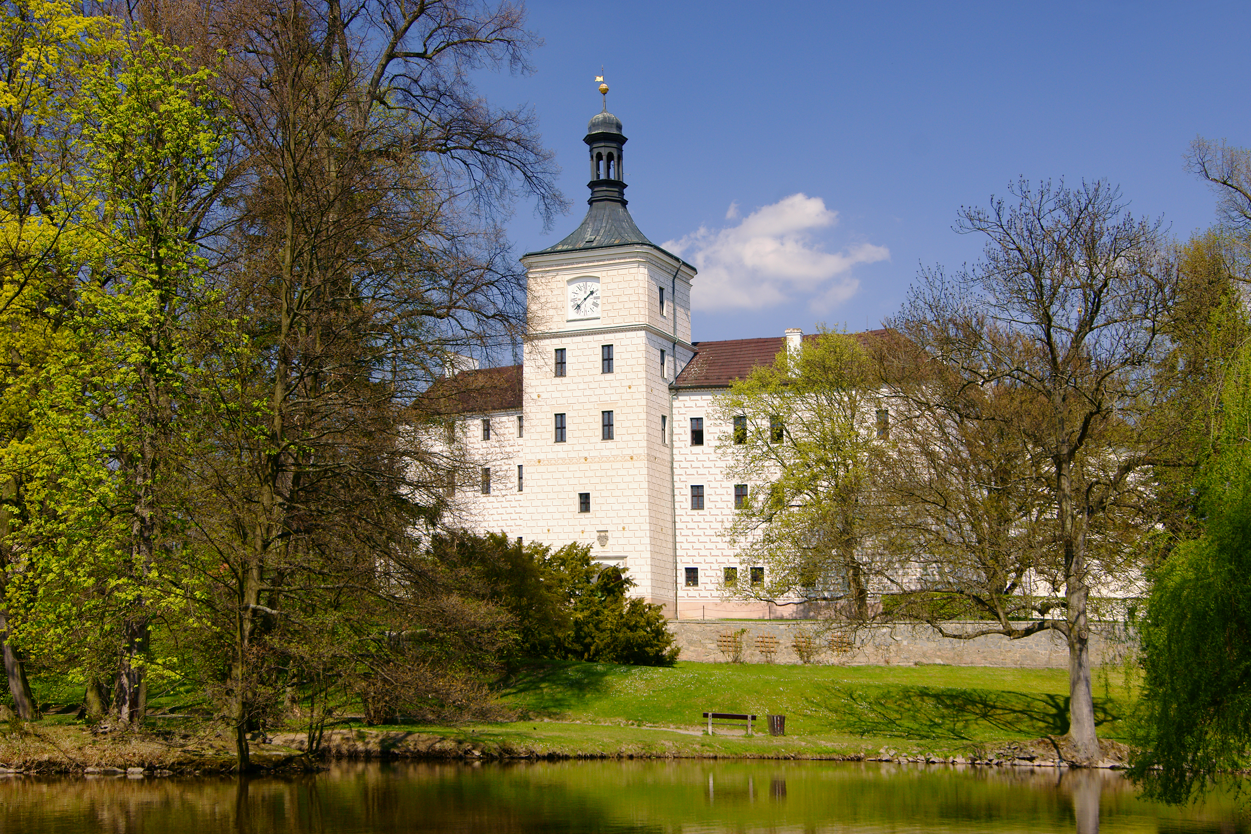 Zámecká věž a rybník v Březnici u Příbrami.